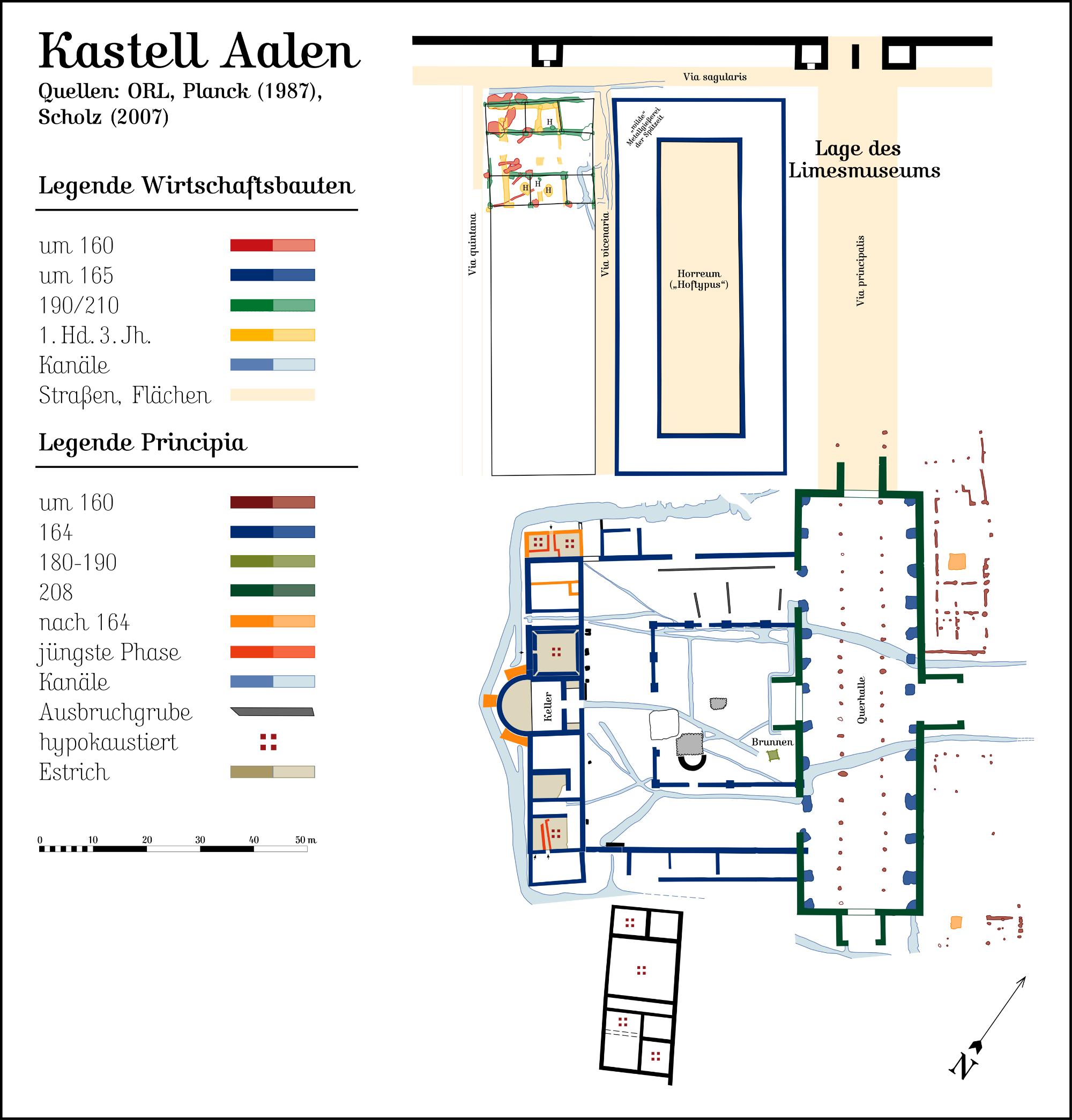 Principia und Wirtschaftsgebäude im limesnahen Reiterkastell Aalen, Baden-Württemberg. Hergestellt am Macintosh unter Macromedia Freehand MX; abgespeichert für Wikipedia unter Adobe Photoshop CS 2. Dies ist die deutsche Originalversion der Zeichnung.